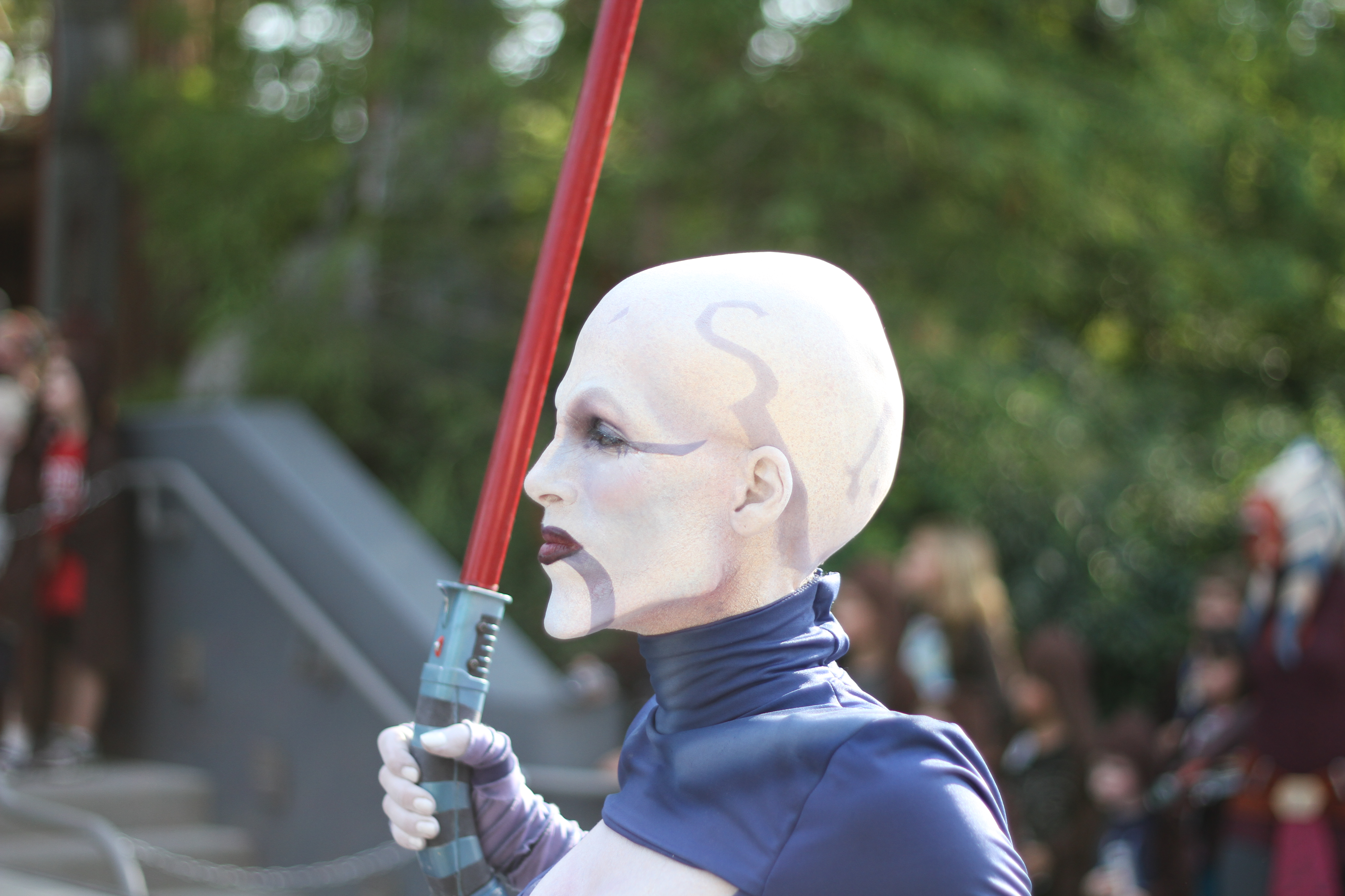 Taken Sunday, May 22nd